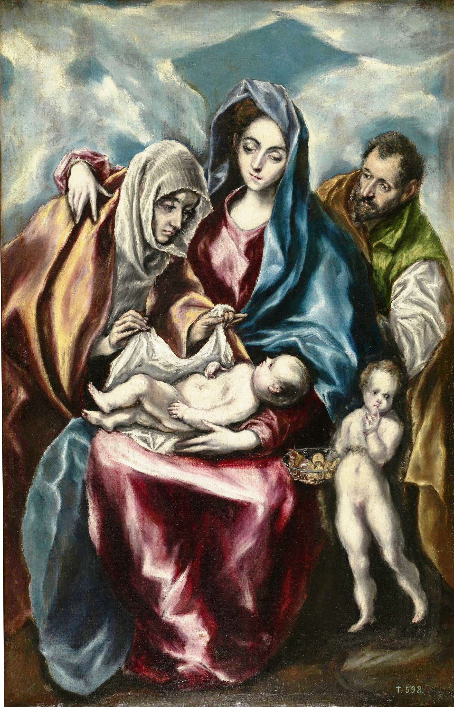 La obra representa a los tres miembros de la Sagrada Familia cristiana junto a Santa Ana, la madre de la Virgen María, y el pequeño San Juan Bautista.